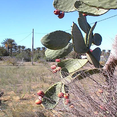 Feigenkaktus auf Djerba mit zahlreichen essbaren, aber stachligen Früchten